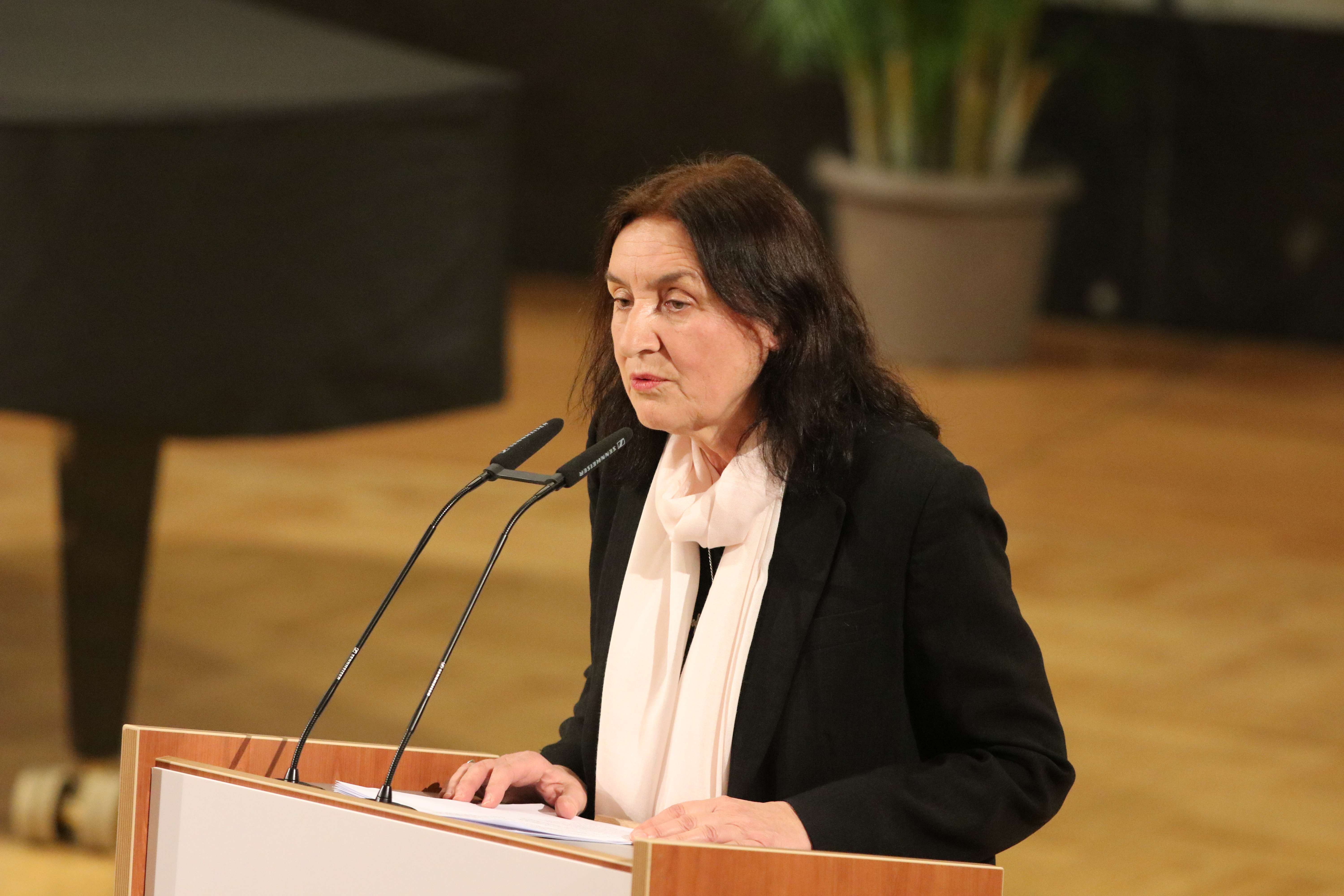 Die Journalistin und Autorin Christiane Schlötzer-Scotland hält beim Geschwister-Scholl-Preis 2019 die Laudatio für den in der Türkei inhaftierten Preisträger Ahmet Altan.